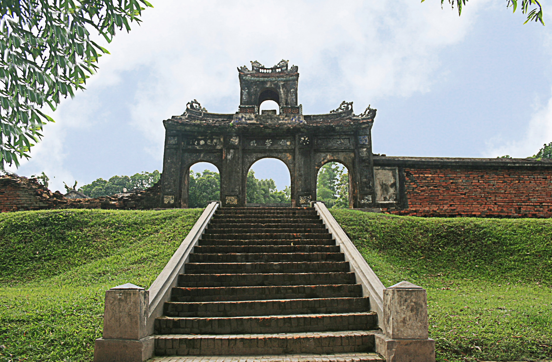 Điện Voi Ré - Nghiễm Nhược Lâm